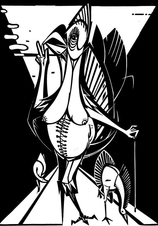 Werner Baumann, "Strichvögel", Linolschnitt, 1960, 42cm x 29,5cm